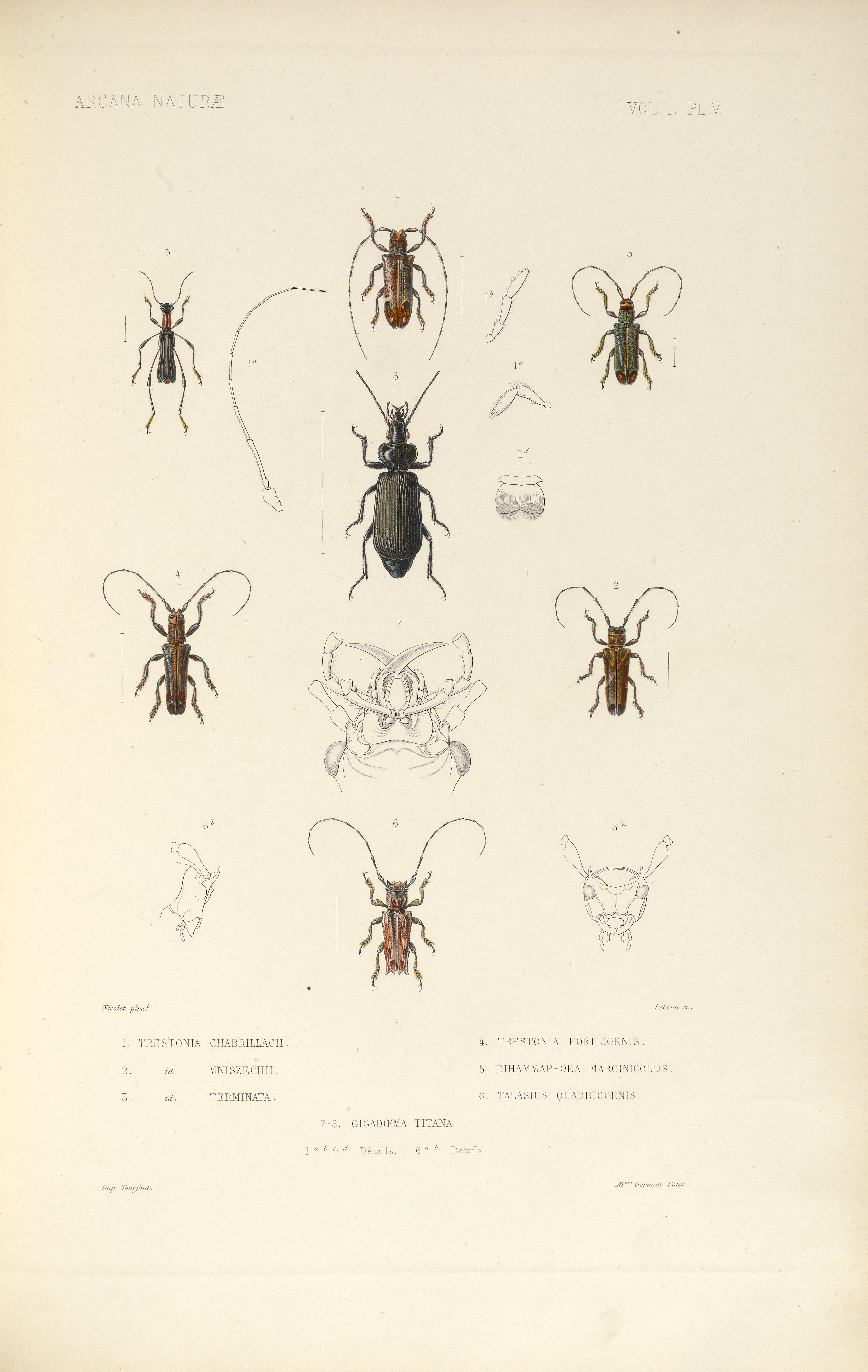 Arcana naturæ, ou Recueil d'histoire naturelle